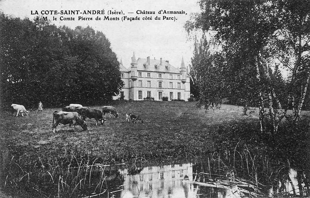 Château d'Armanet, façade côté du parc, Balbins, Isère (38), France. Carte postale du 1913.